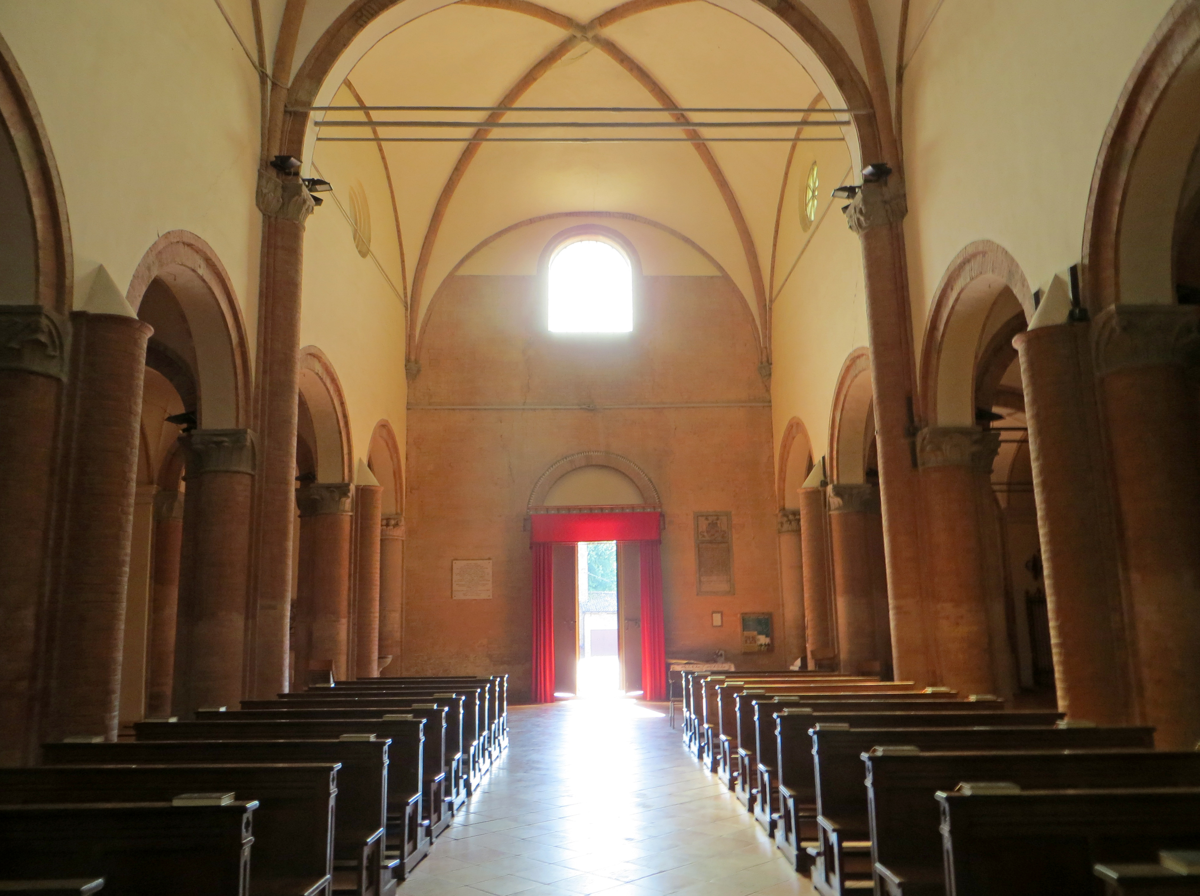 Monastero di Santa Maria Assunta (Castione Marchesi, Fidenza) - navata centrale e controfacciata